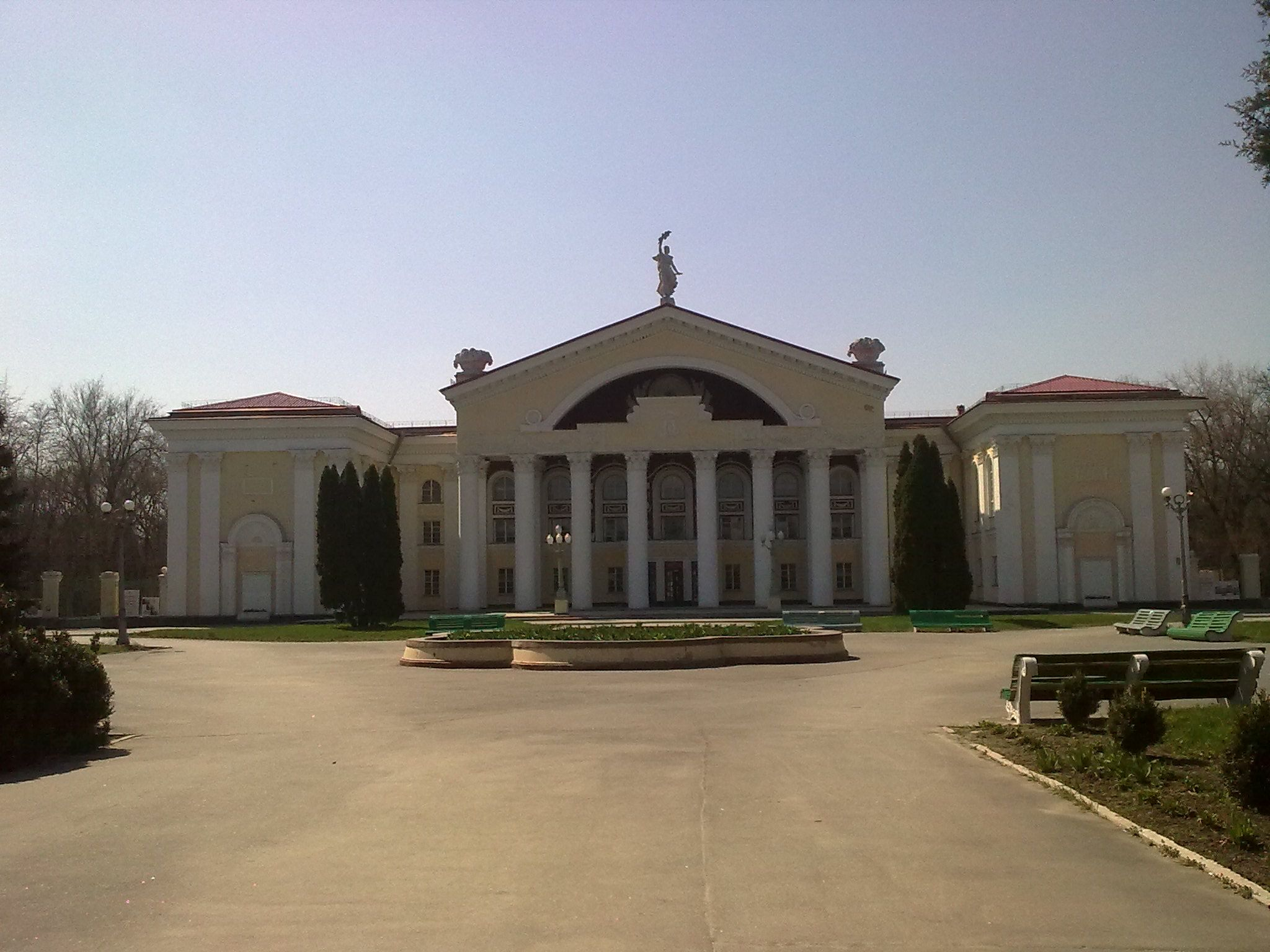 Palast der Kultur in Schowti Wody